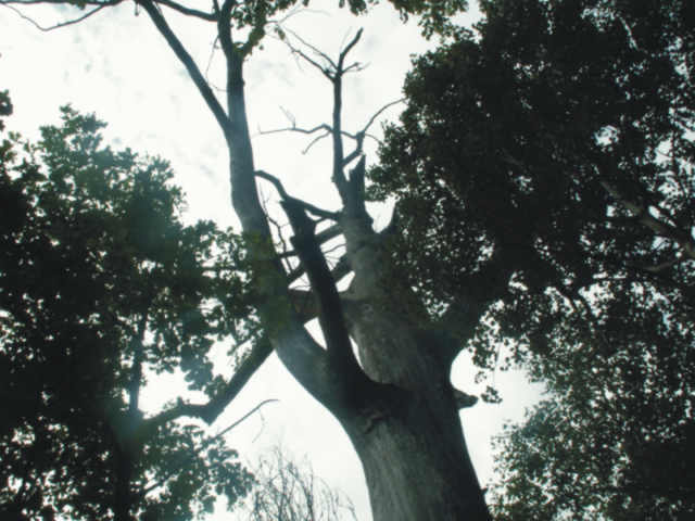 Dąb Car - korona (2005)